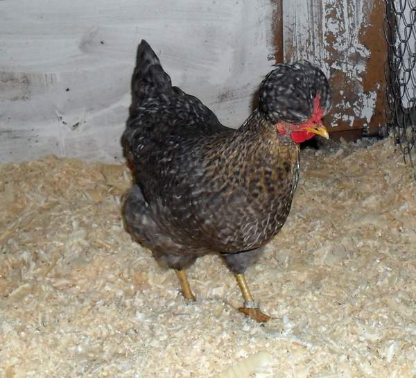 Чубатая 3